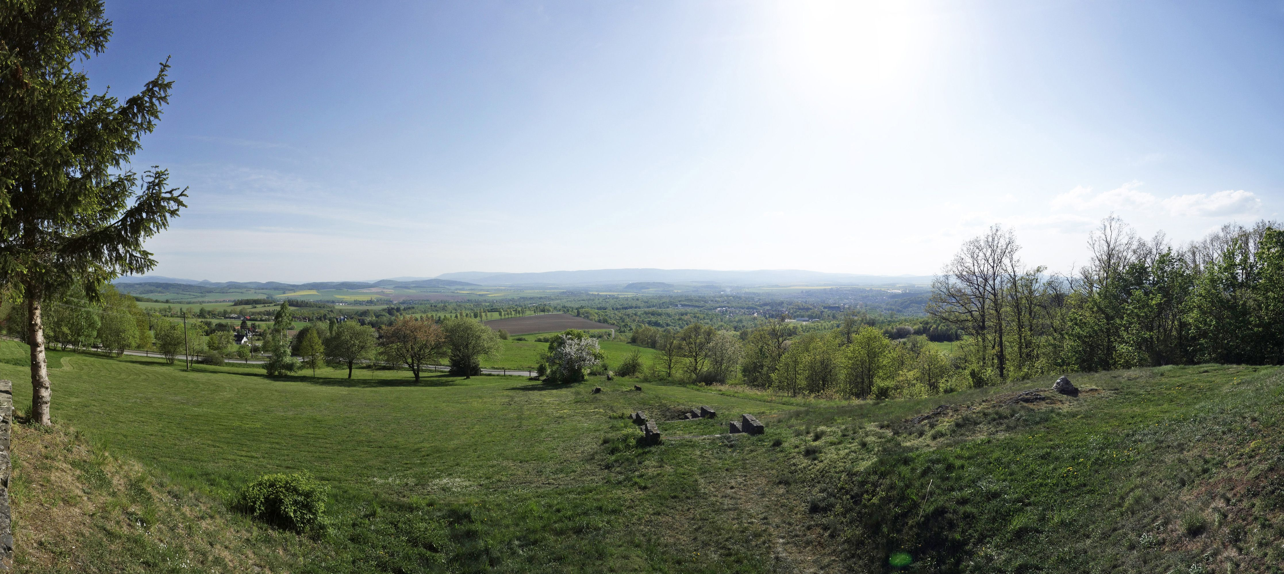 Panorama von der Schneiderbaude (Zajazd Kukułka) bei Glatz (Kłodzko) aus, von Süd bis West